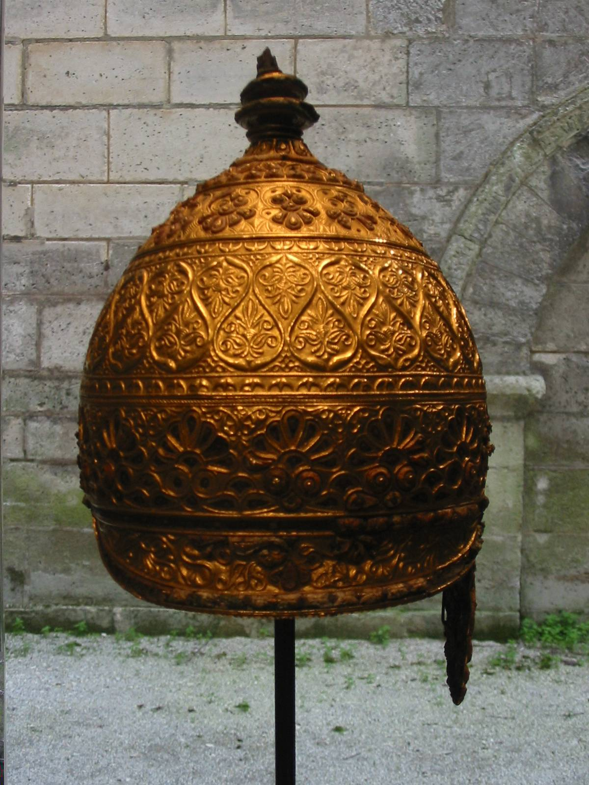 casque gaulois d'Agris, musée d'Angoulême, France